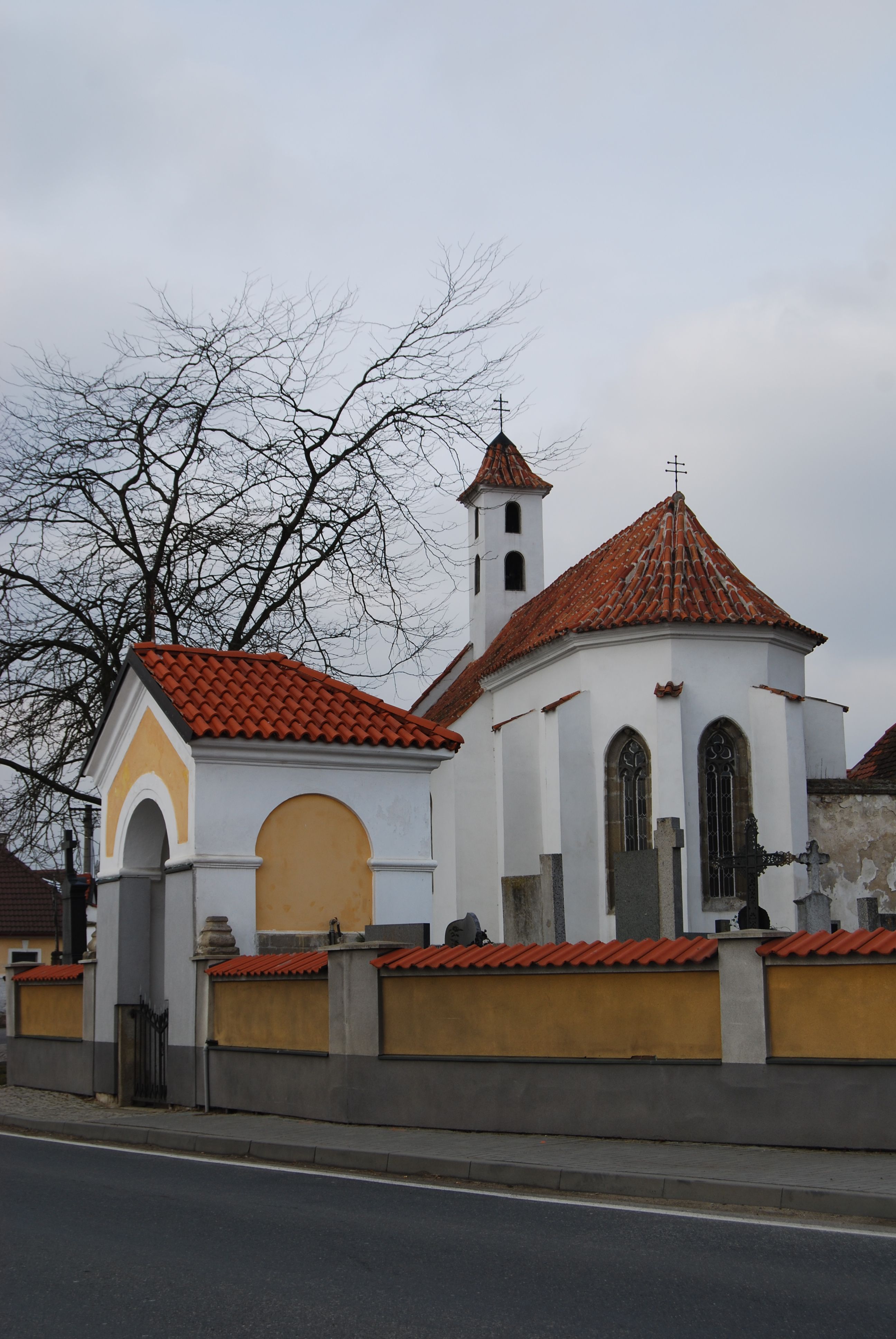 Kaple a kostel v obci. Dobev. Okres Písek. Česká republika.